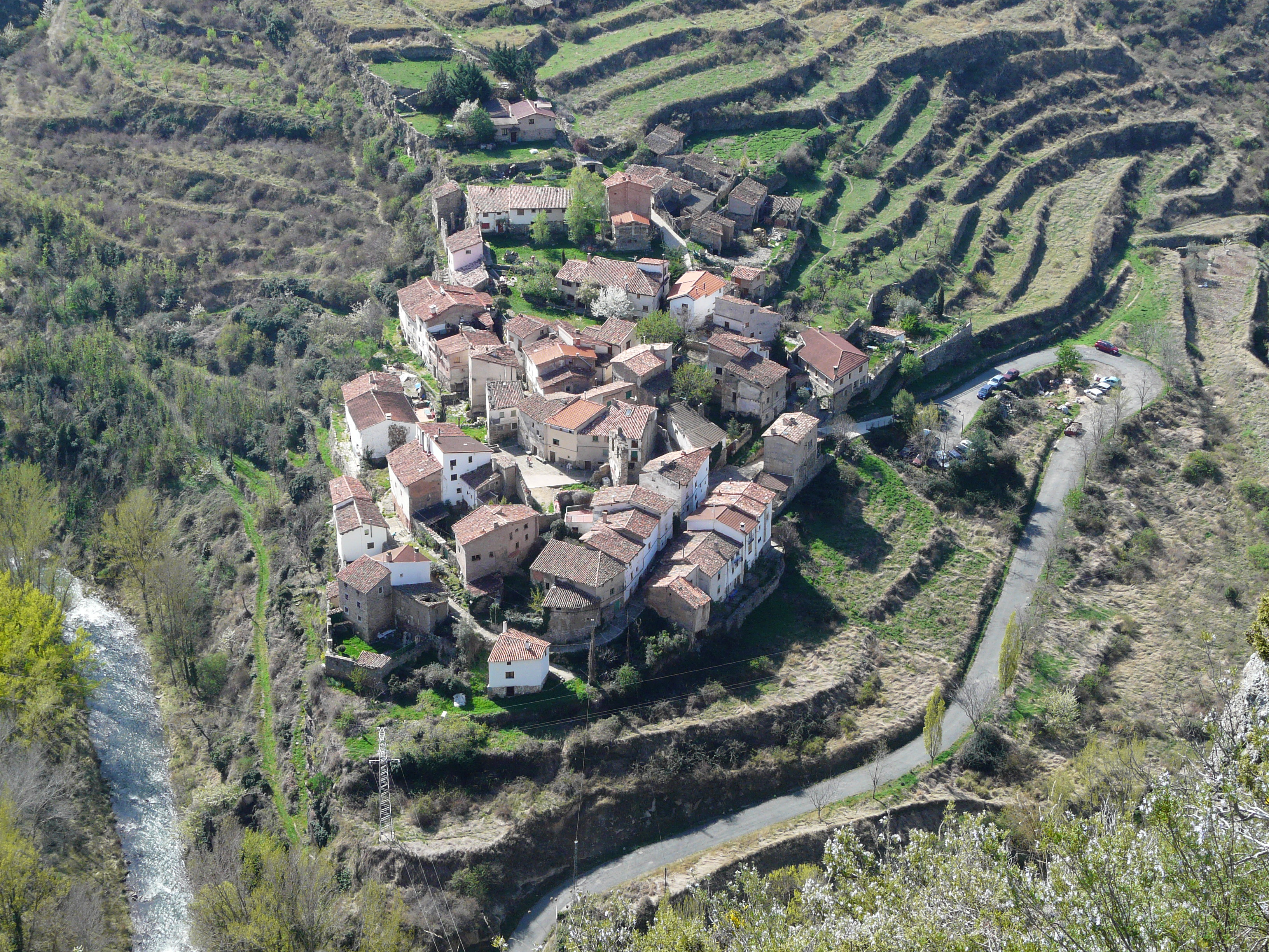 Vista aerea de Peroblasco